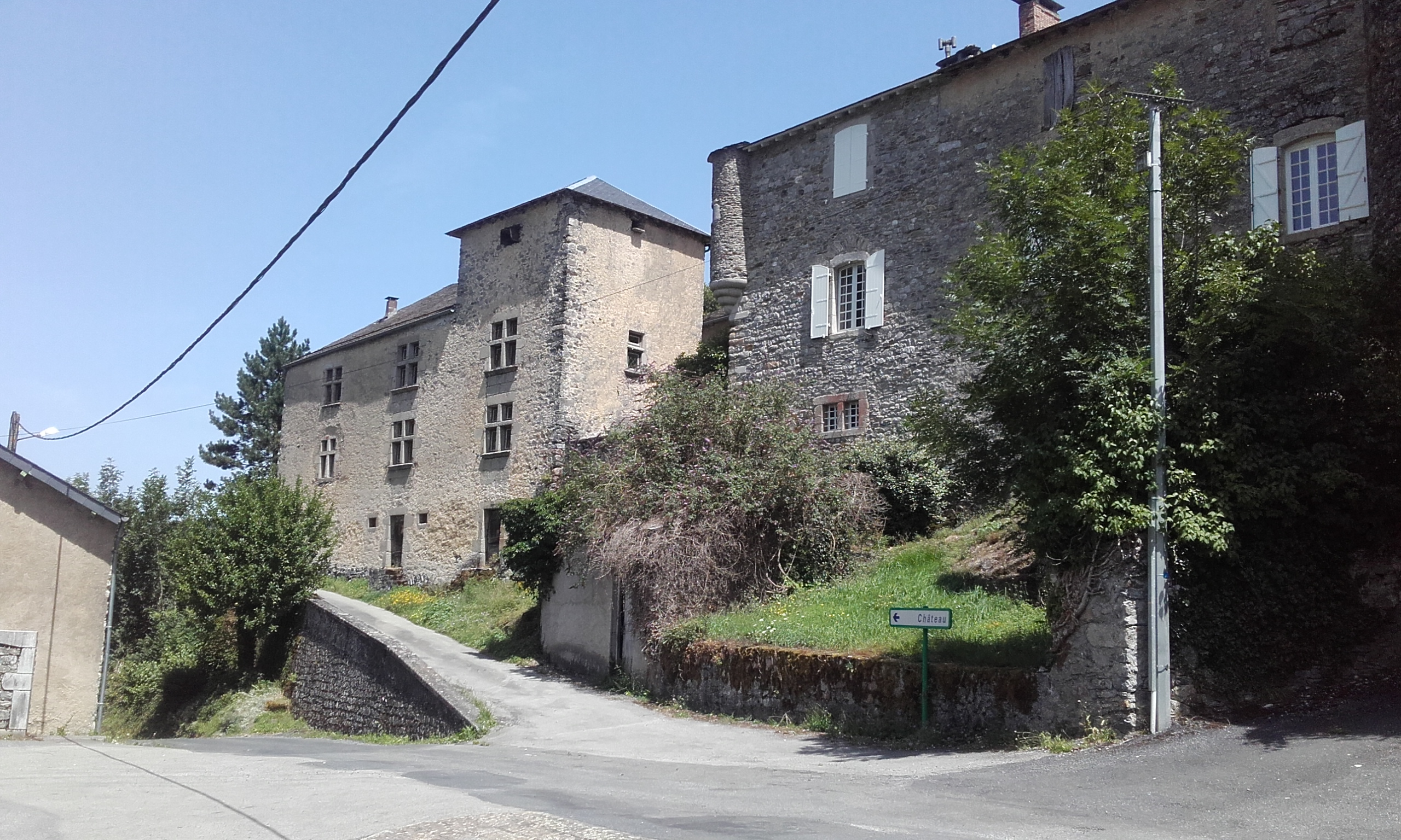 Espérausses (Tarn) : Vue des deux bâtiments du château depuis la place de la salle des fêtes du village, au Sud Ouest